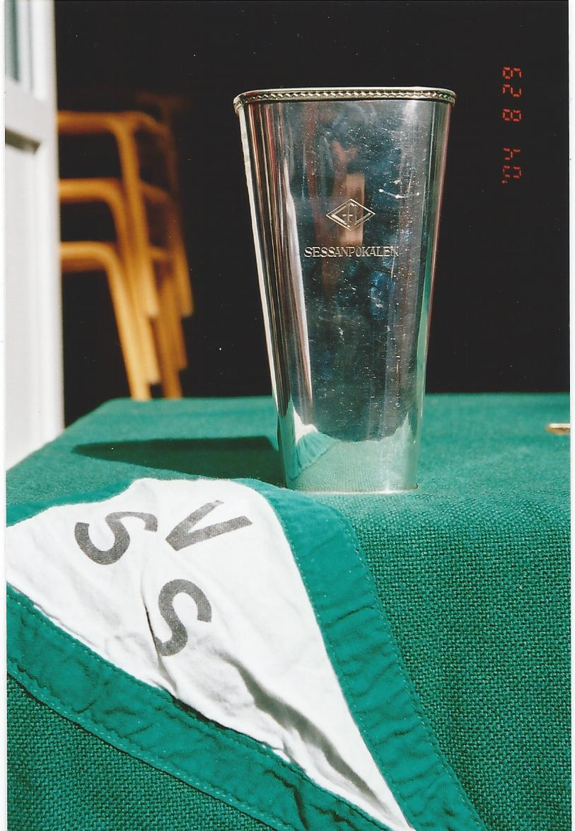 Bild på Sessanpokalen från seglingarna i Stockholm 2004. Tävlingen arrangerades av Vikingarnas Segelsällskap.